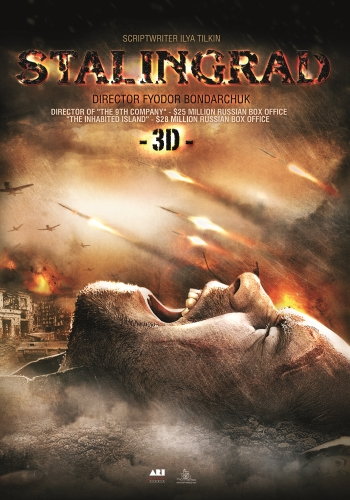 Stalingrad film poster